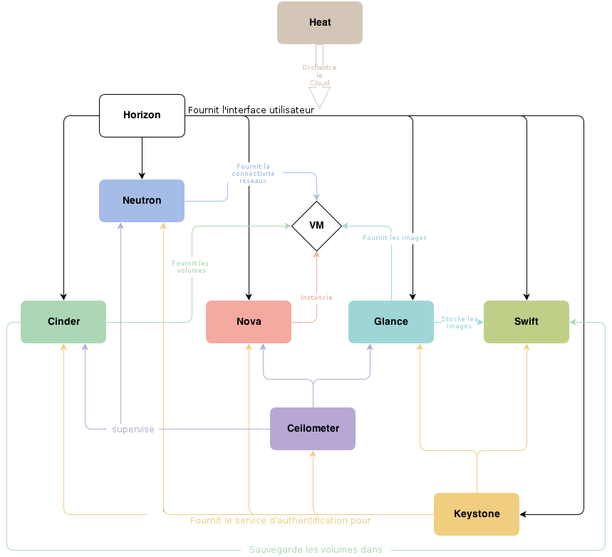 Architecture conceptuelle des services de l'IaaS libre OpenStack